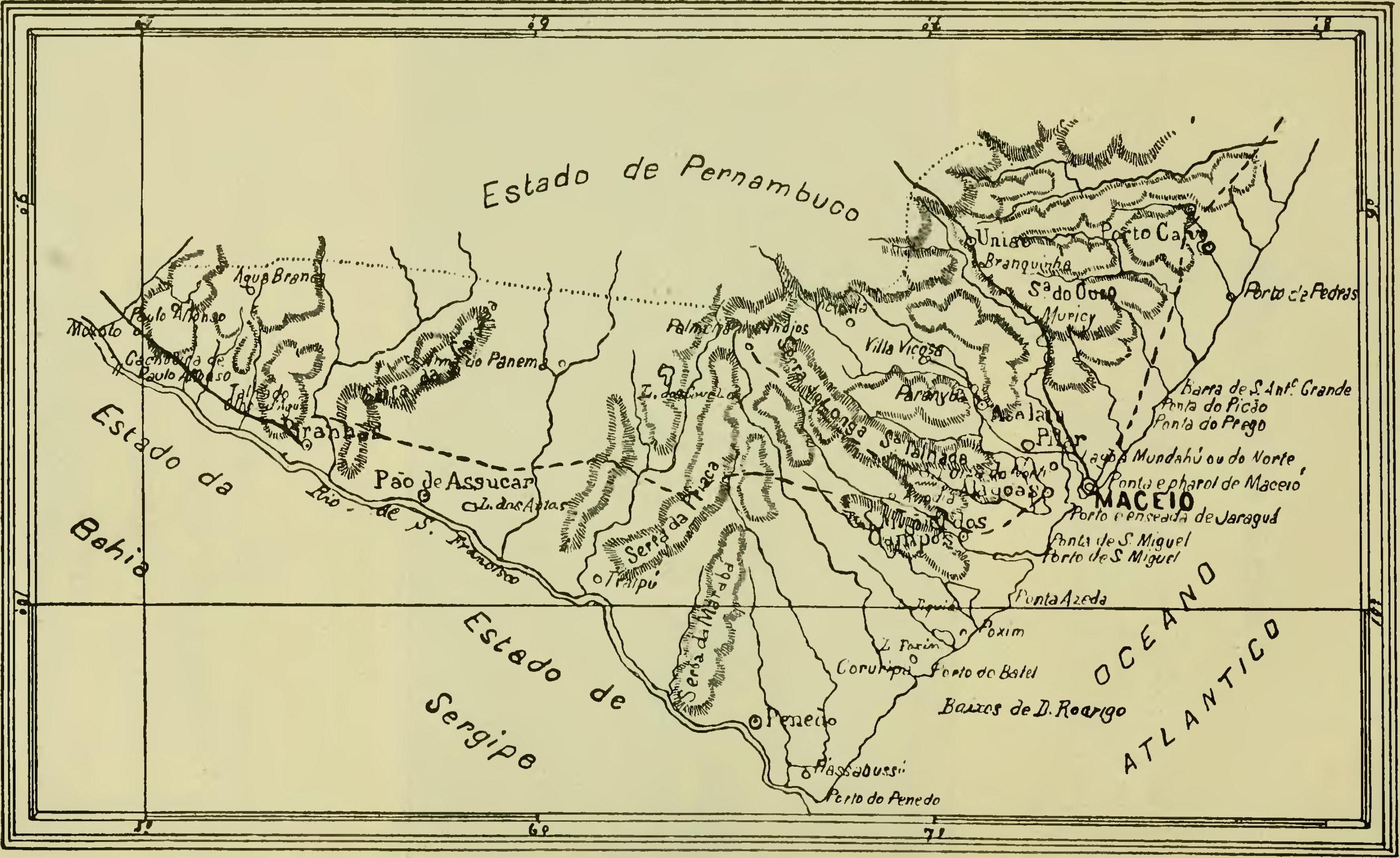 Português do Brasil: Mapa de Alagoas, c.1903.